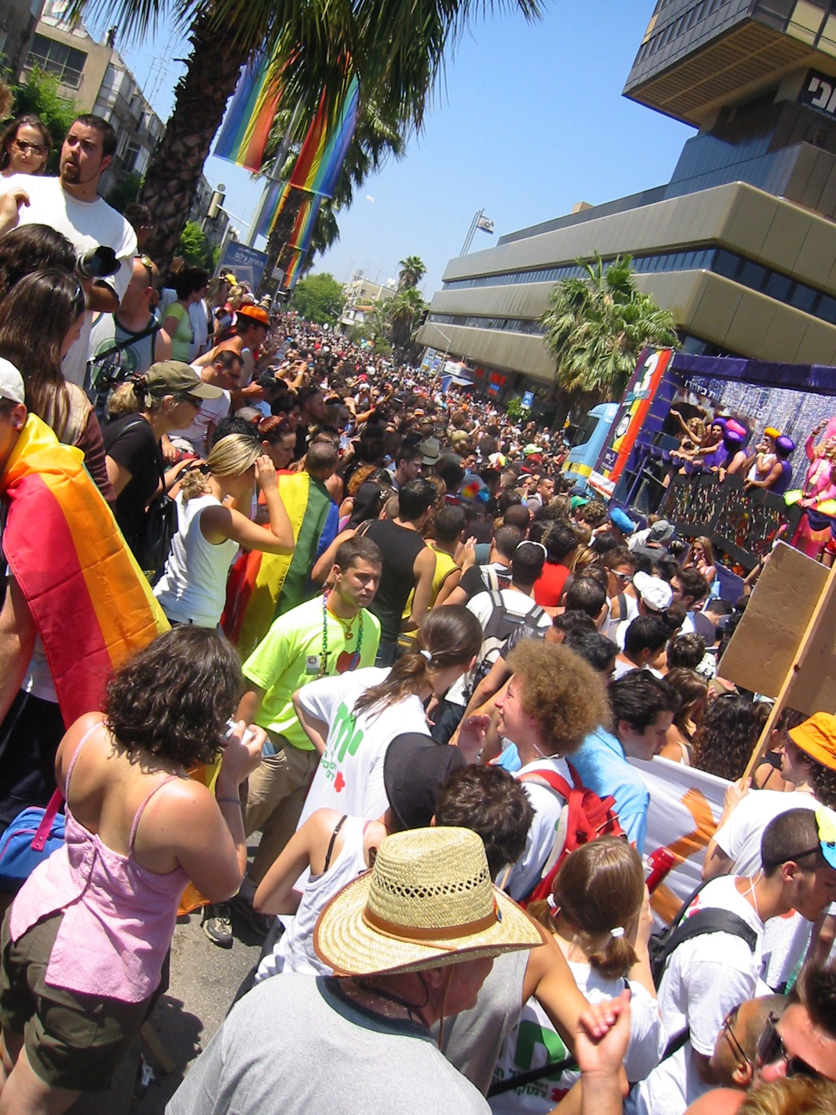 Gay pride parade in Tel Aviv, Israel in 2004.